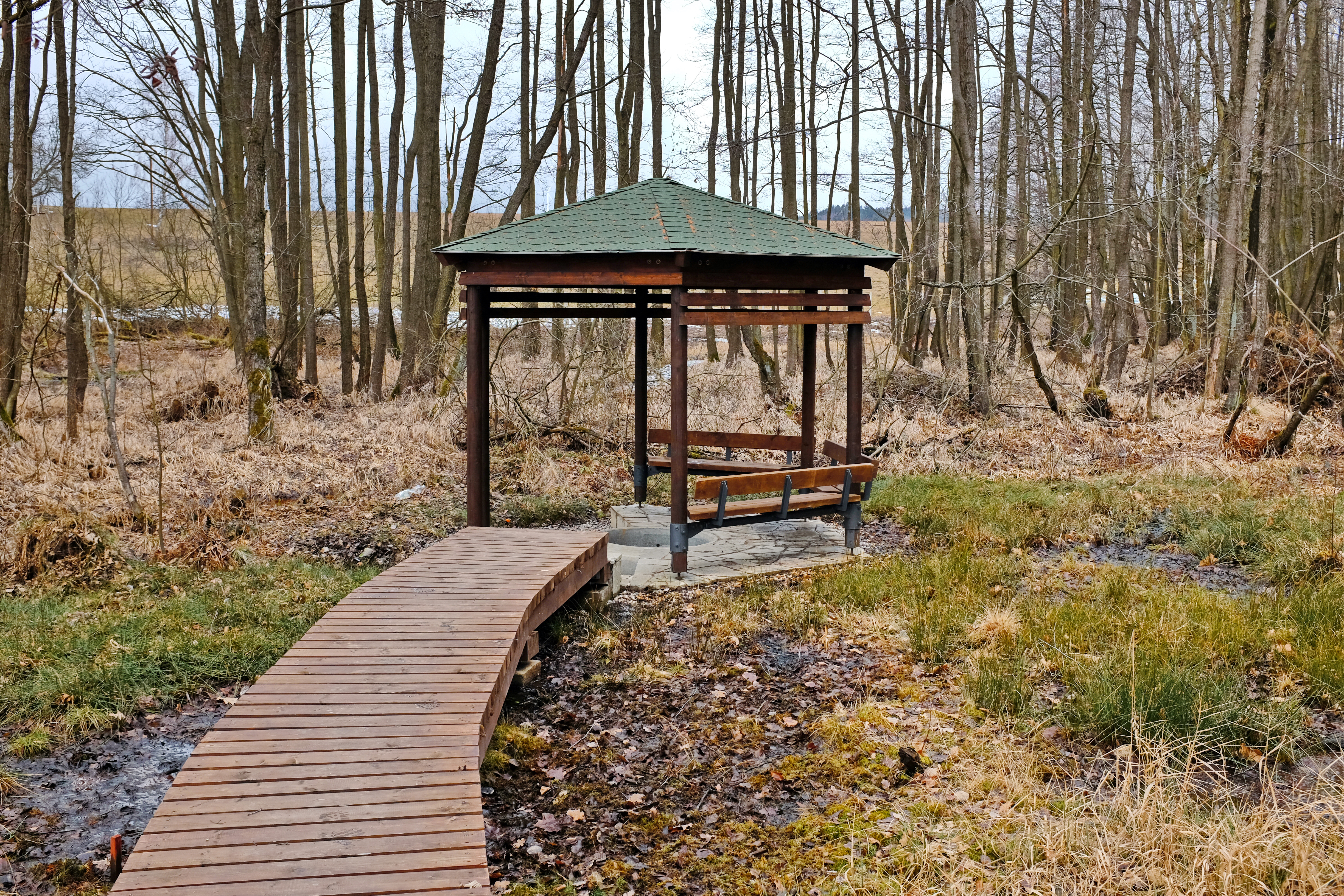 Minerální pramen v nivě Svažeckého potoka u Kopaniny, okres Cheb